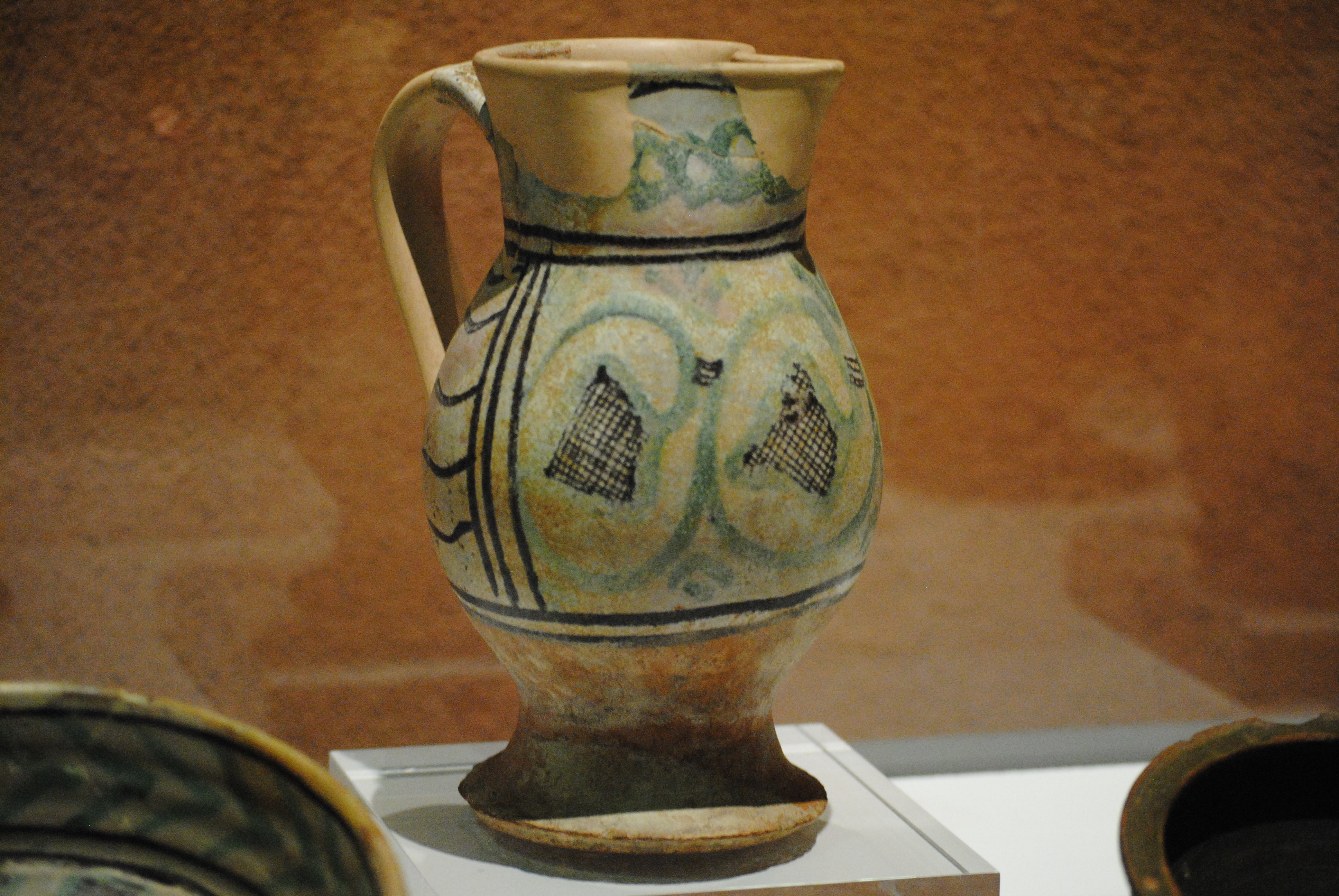 Boccale in maiolica arcaica di produzione pisana, risalente al XIII secolo (recuperato duranete i lavori di ristrutturazione presso la Torre della Fame, Pisa). Museo nazionale di San Matteo.